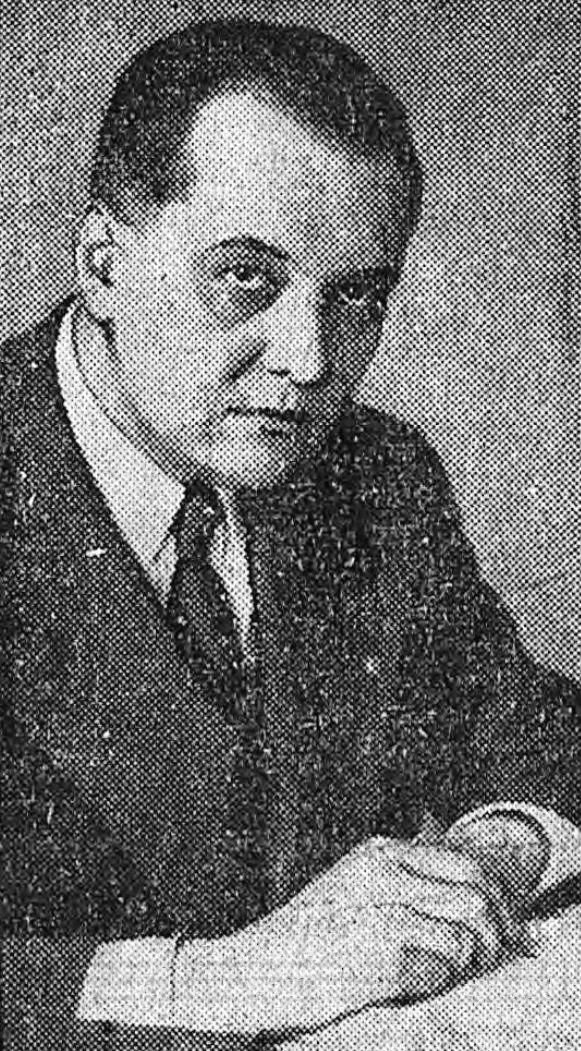 "M. Charles Trochu, président [du conseil municipal de Paris]".